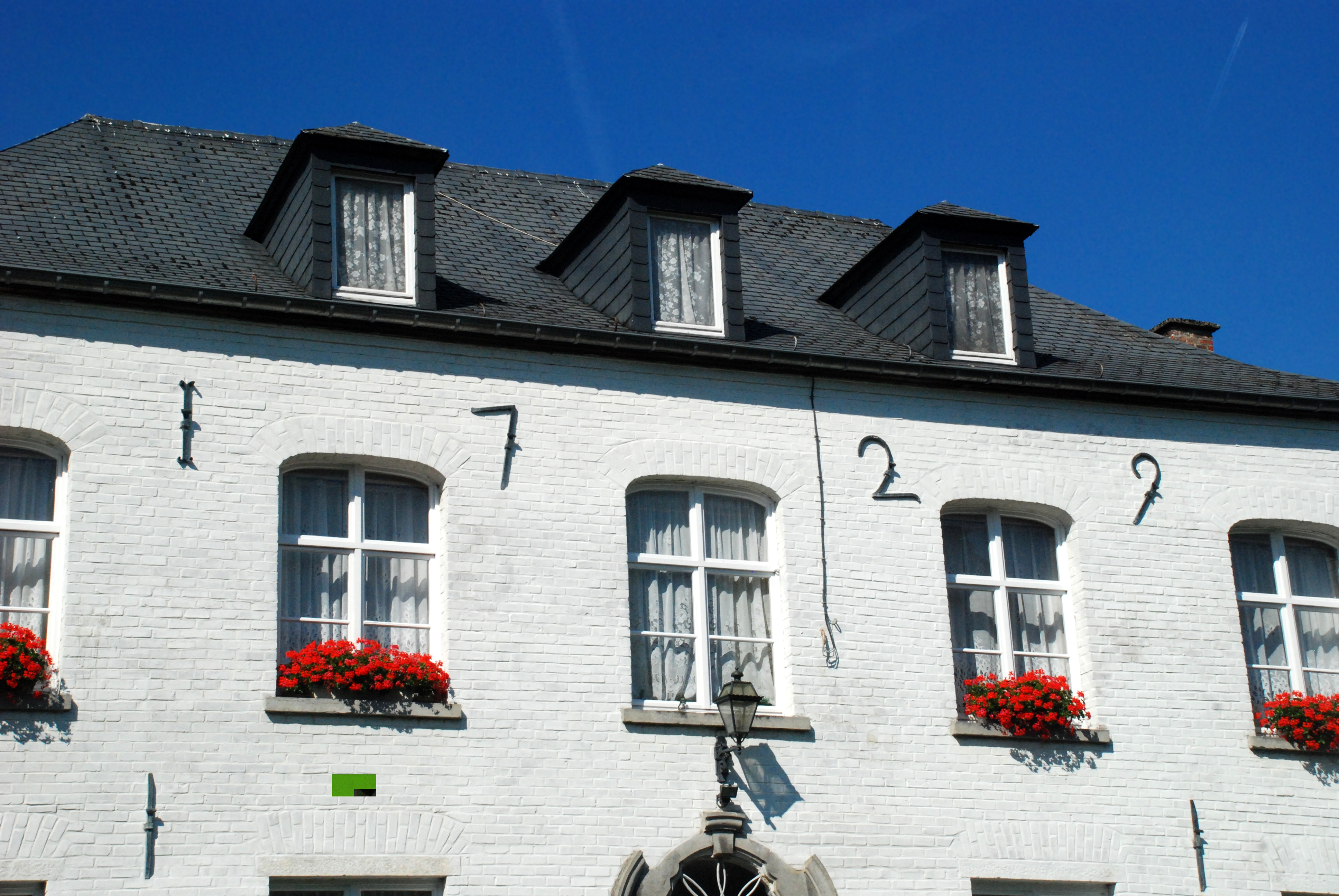 Belgique - Brabant wallon - Lasne - Ohain - Cure de l'église Saint-Étienne